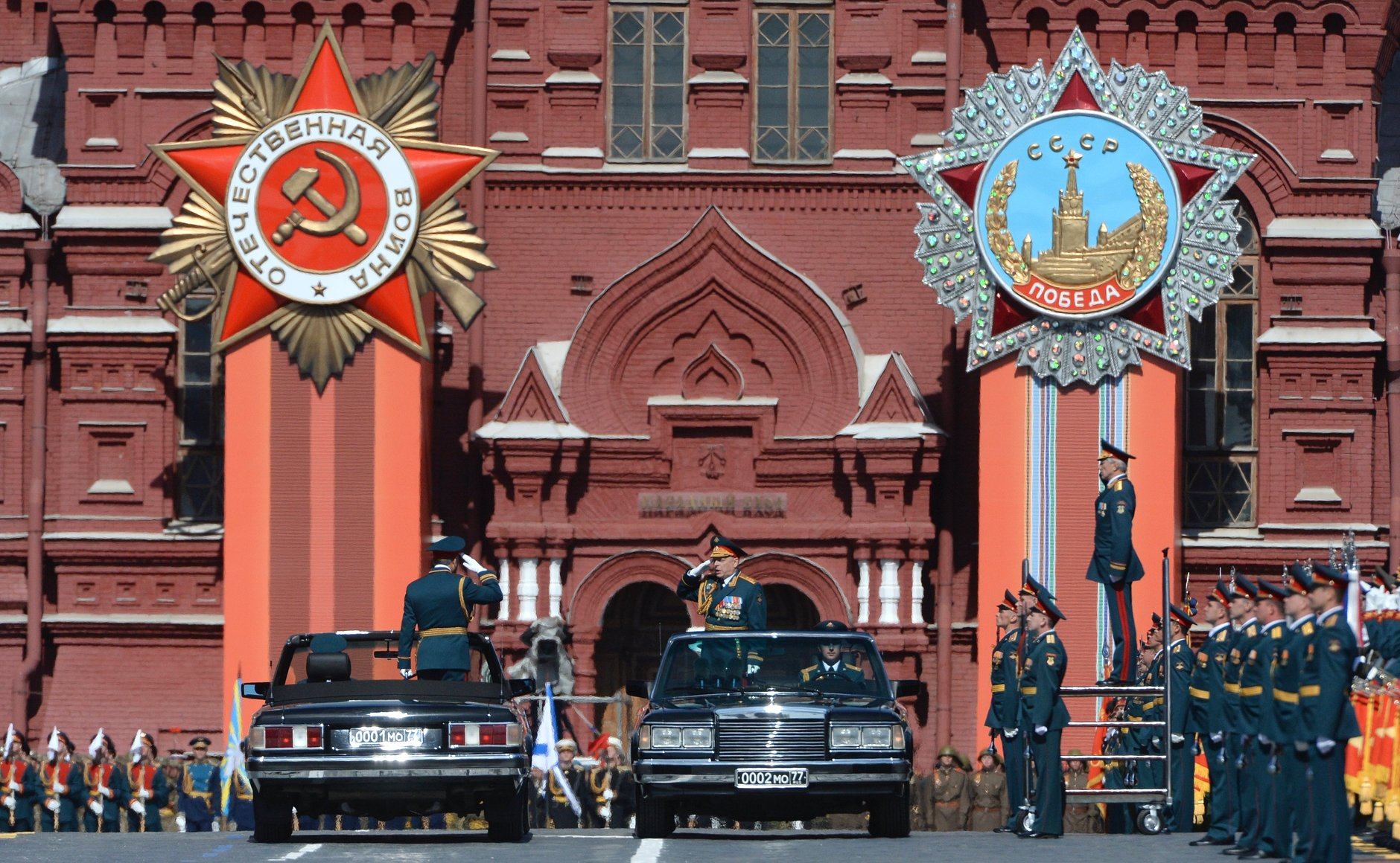 Военный парад в ознаменование 70-й годовщины Победы в Великой Отечественной войне 1941–1945 годов.